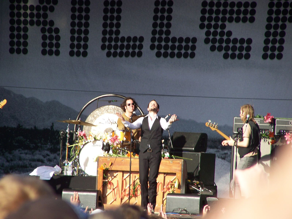 The Killers actuando